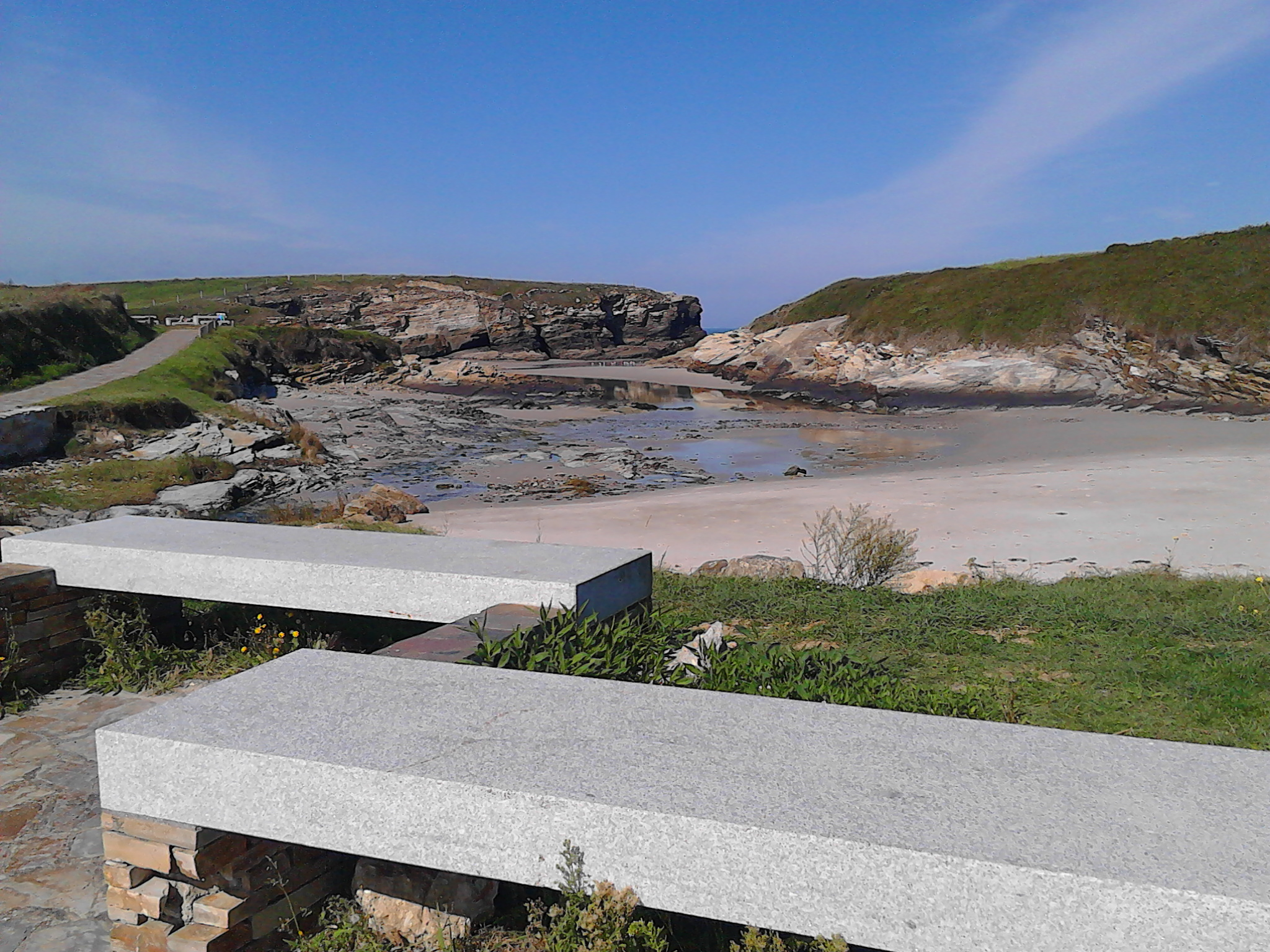 Praia de Esteiro, A Devesa, Ribadeo, a media marea Categoría:Imaxes de praias de Ribadeo Categoría:Imaxes de parroquias de Ribadeo